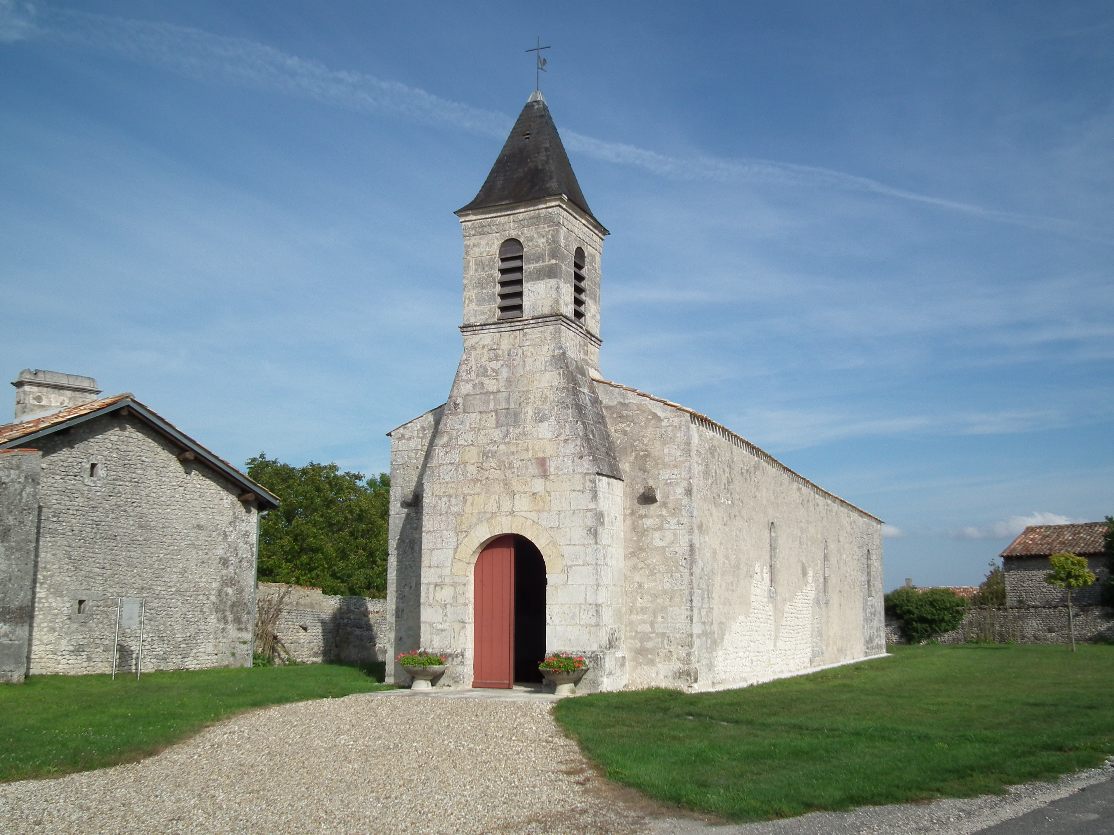 L'église de Saint-Maurice-de-Tavernole